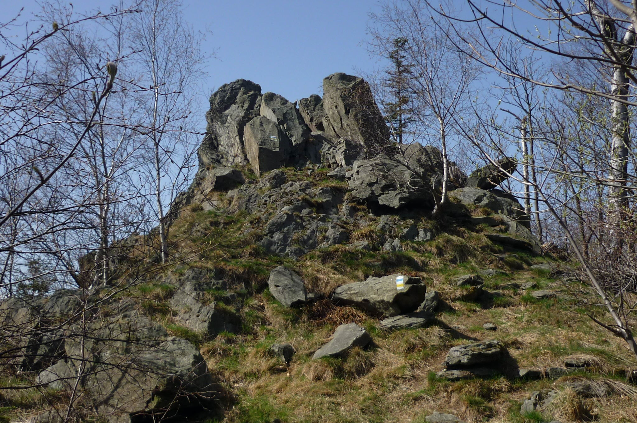 Okole - szczyt północnego pasma Gór Kaczawskich